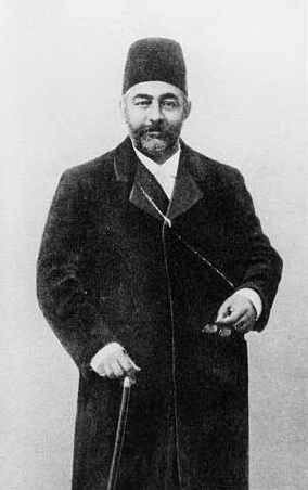 میرزا علی اصغر خان اتابک